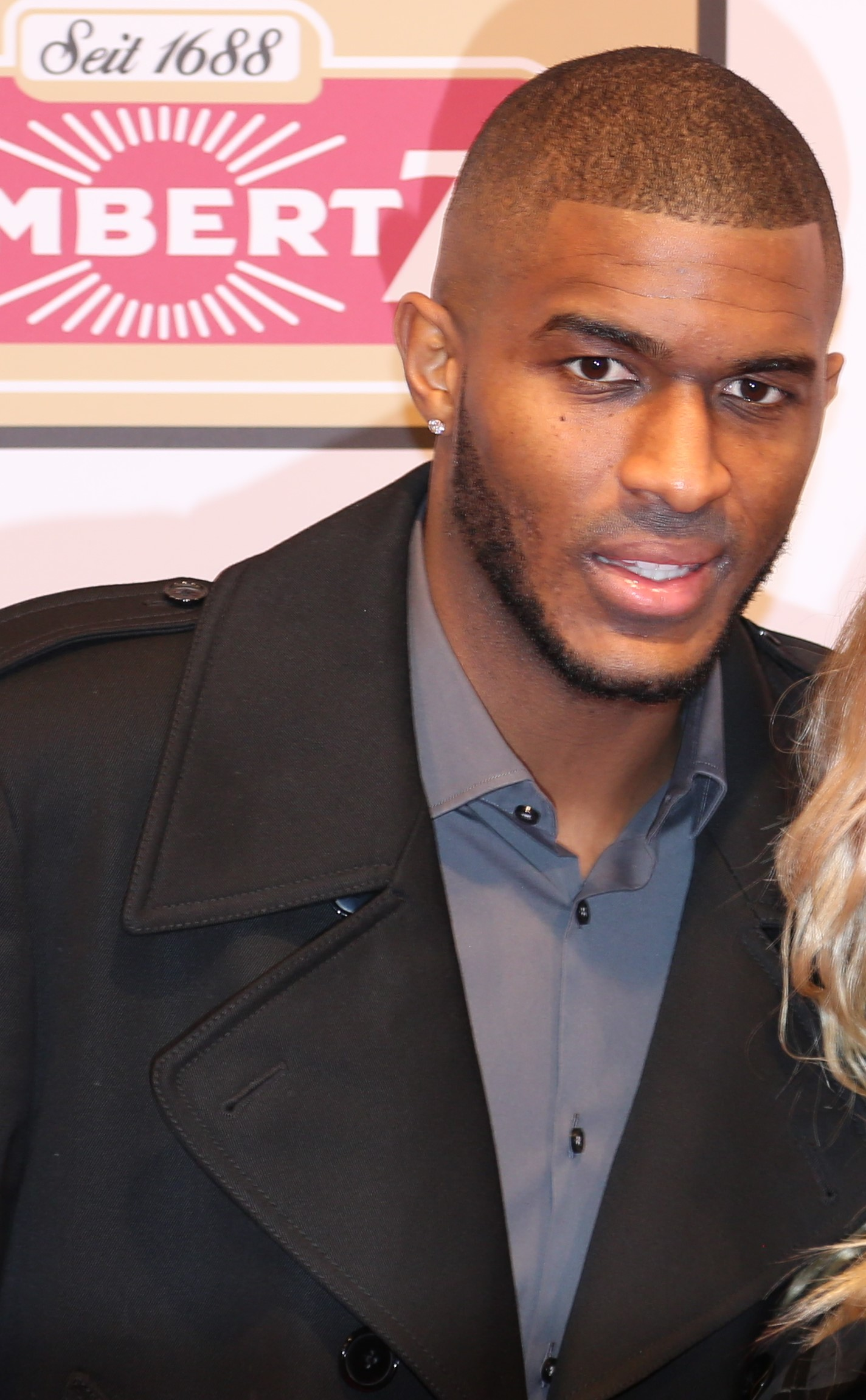 Anthony Modeste bei der Lambertz Monday Night 2017.